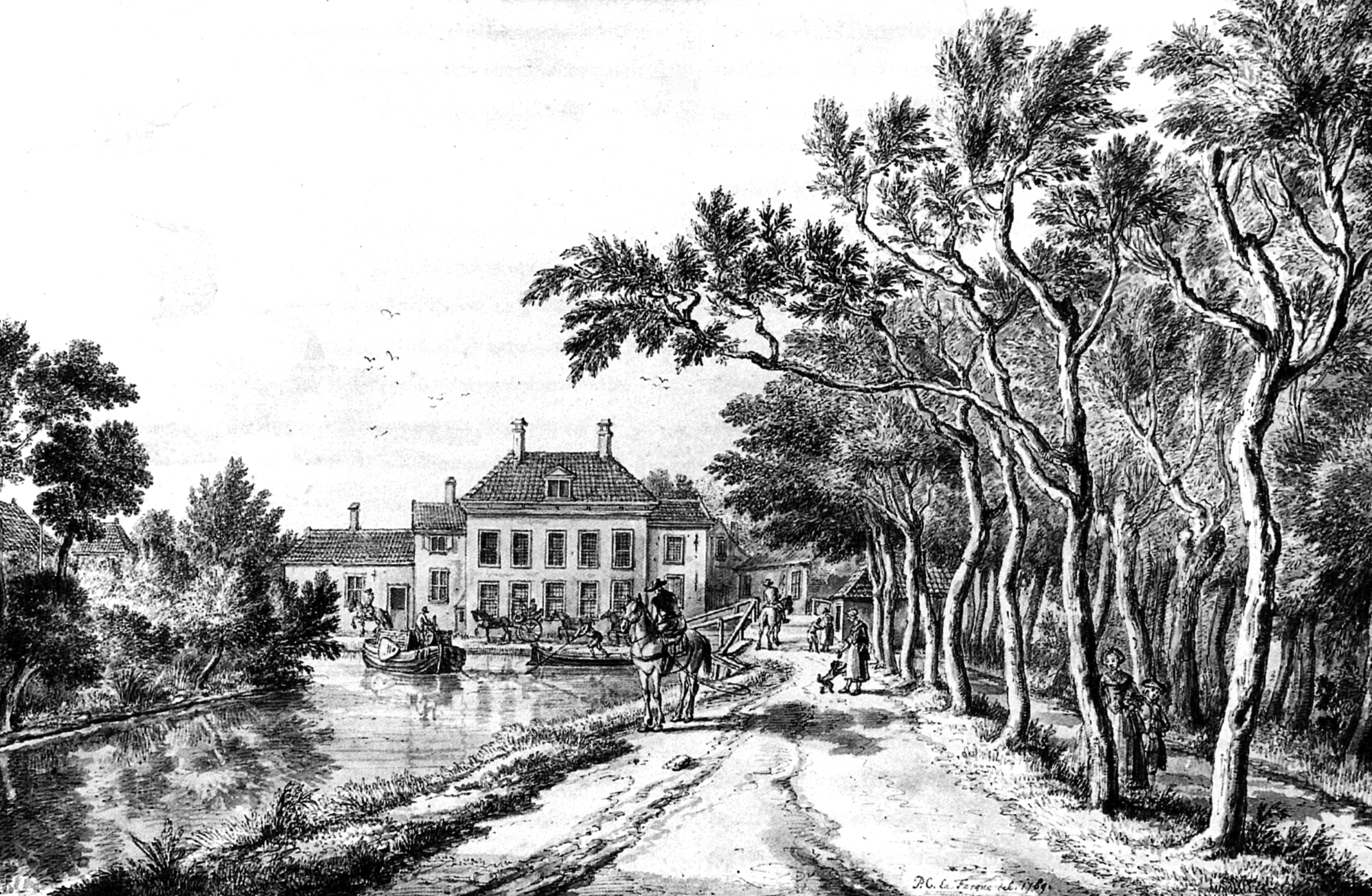 Buitenplaats Drievliet (vanaf de Geestbrugkade)